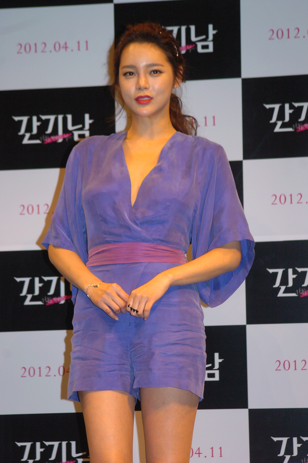 간기남 제작보고회